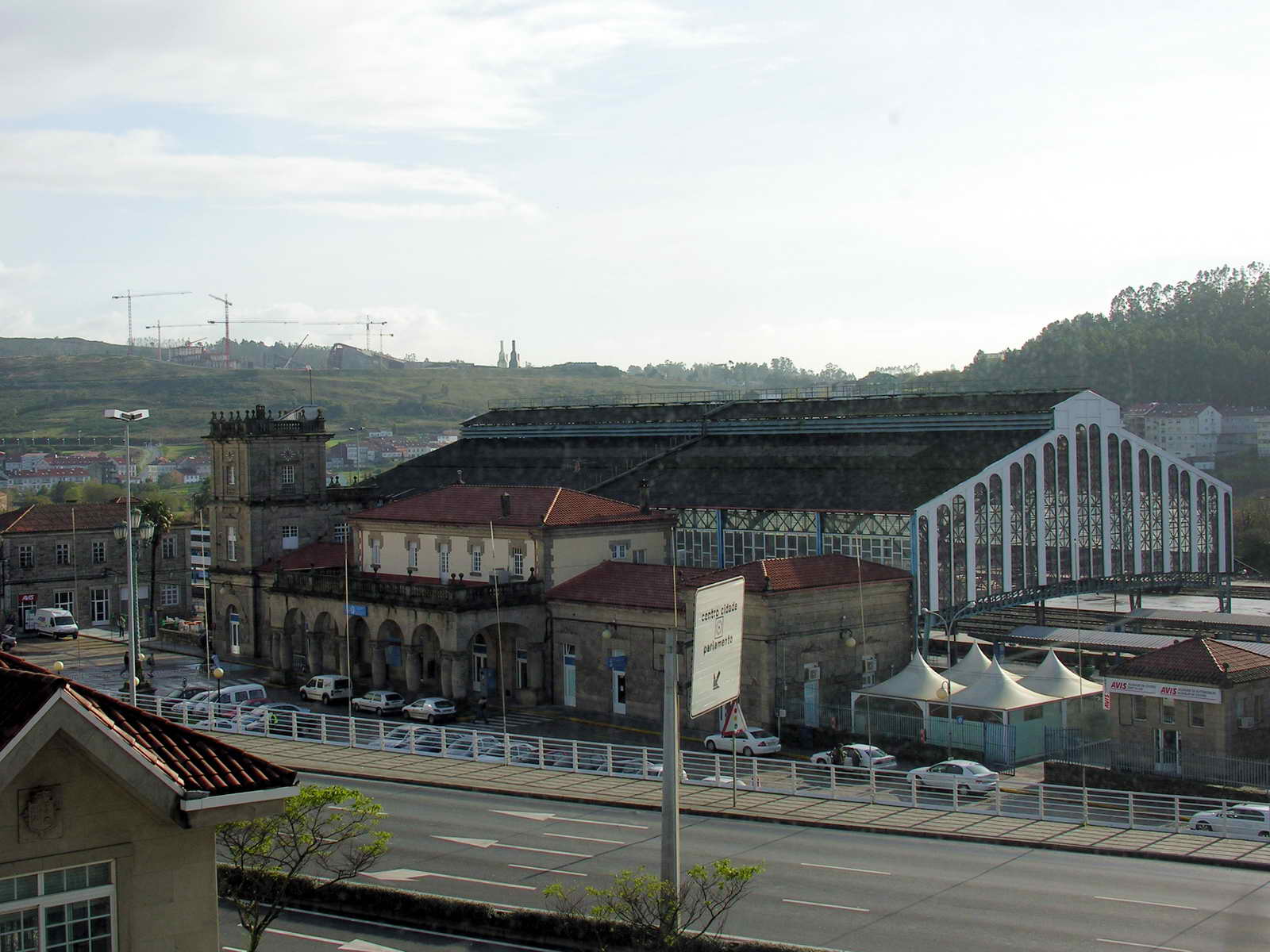 self made. Santiago de Compostela, Galicia.